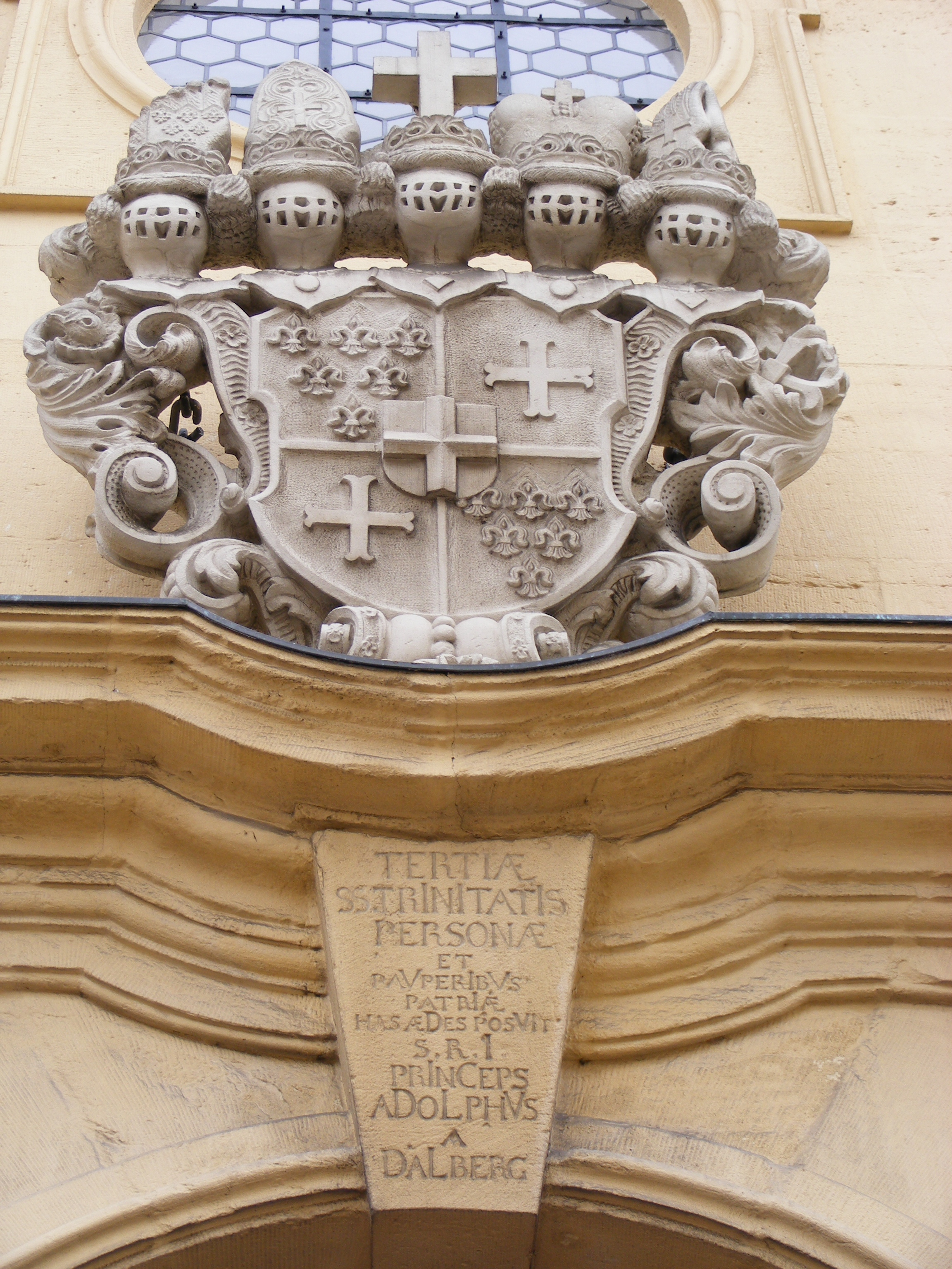 Fulda - Heilig-Geist-Kirche - Wappenrelief und Inschrift über dem Eingang.